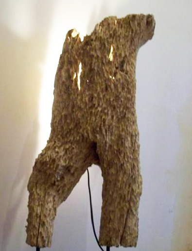 houtsculptuur torso